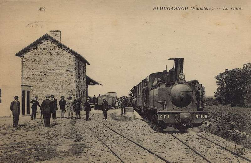 Carte postale ancienne éditée par ND, n°1452 :Gare de Plougasnou des Chemins de Fer Armoricains